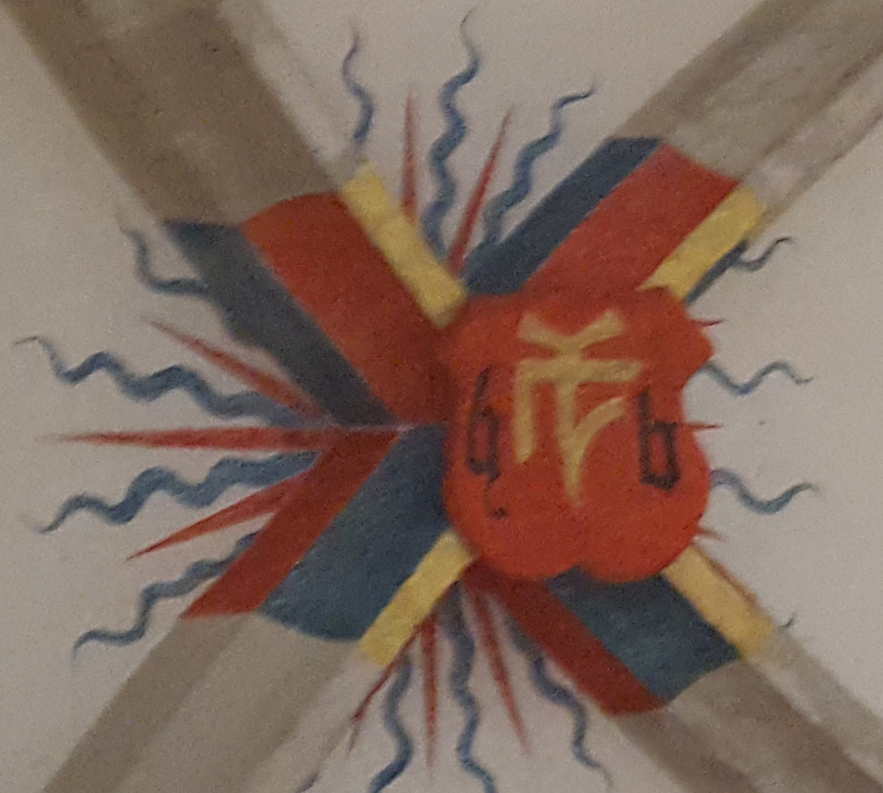 Steinmetzzeichen von Hans Buß (deutscher Baumeister Anfang 16. Jhdt.) im Turmgewölbe der Kirche Sankt Wendelin in Schlaitdorf